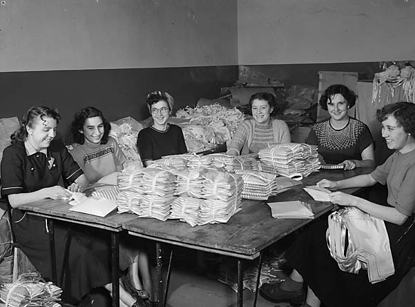 Teitl Cymraeg/Welsh title: Ffatri Bronglymau Berlei, Glyn Ebwy. Ffotograffydd/Photographer: Geoff Charles (1909-2002) Dyddiad/Date: November 30, 1951. Cyfrwng/Medium: Negydd ffilm / Film negative Cyfeiriad/Reference: (gch02420) Rhif cofnod / Record no.: 3368319 Rhagor o wybodaeth am gasgliad Geoff Charles yn Llyfrgell Genedlaethol Cymru More information about the Geoff Charles Collection at the National Library of Wales